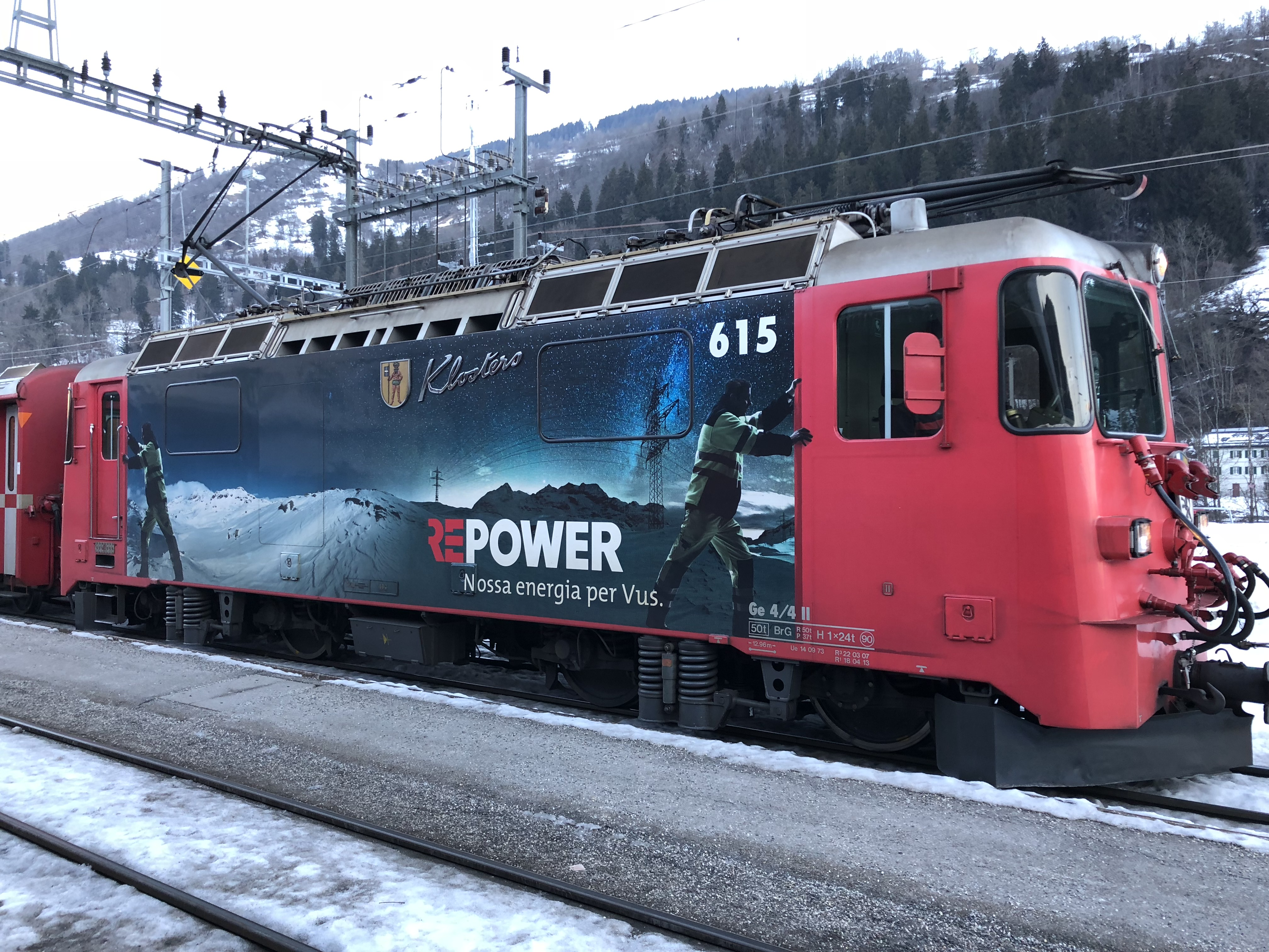 RhB-Lok Repower AG